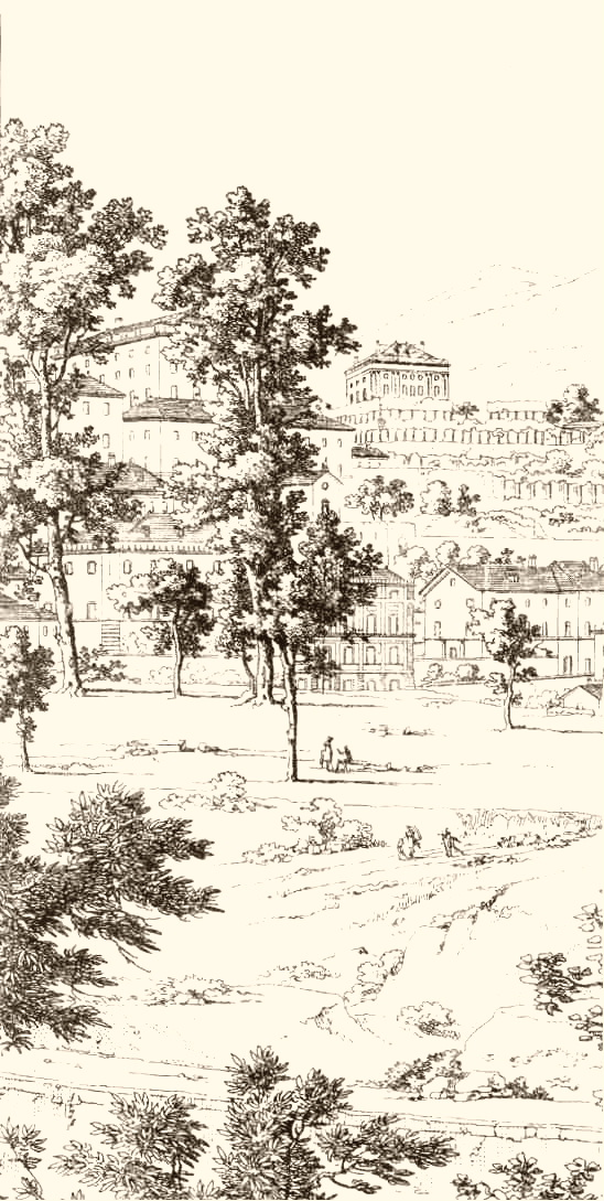 Genova, Parco dell'Acquasola Incisione dell'Ottocento di Lucien Marcelin Gautier (1850-1925)